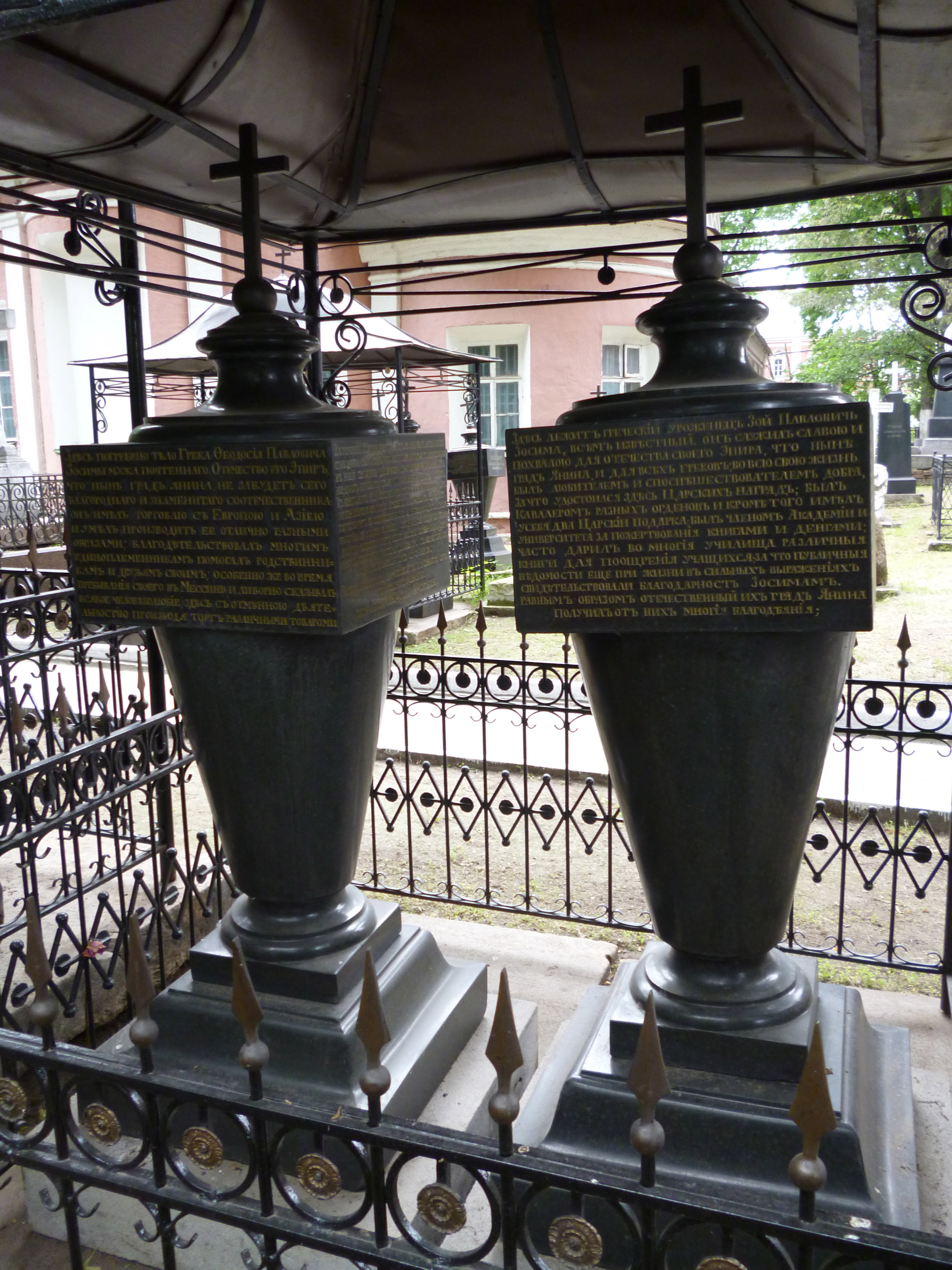 Могилы Зоя Павловича Зосимы и Феодосия Павловича Зосимы.